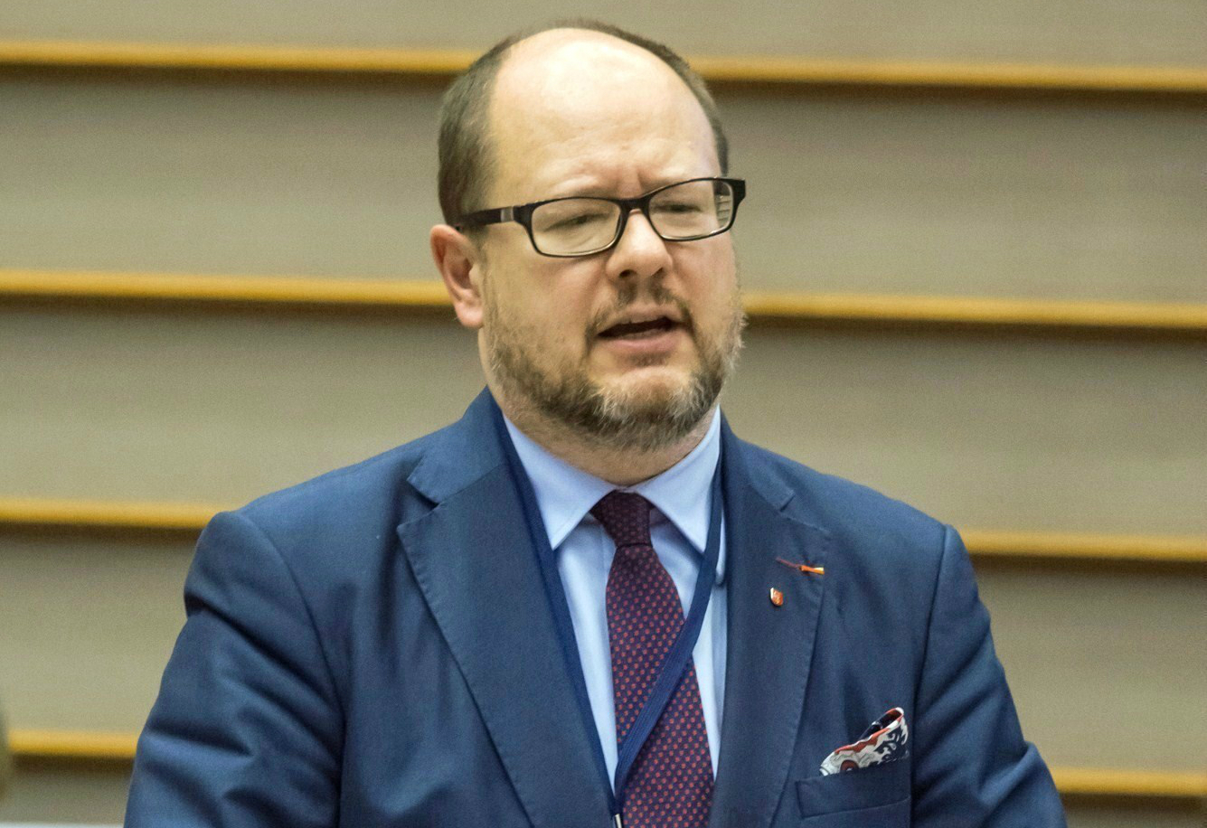 Paweł Adamowicz, wieloletni prezydent Gdańska.